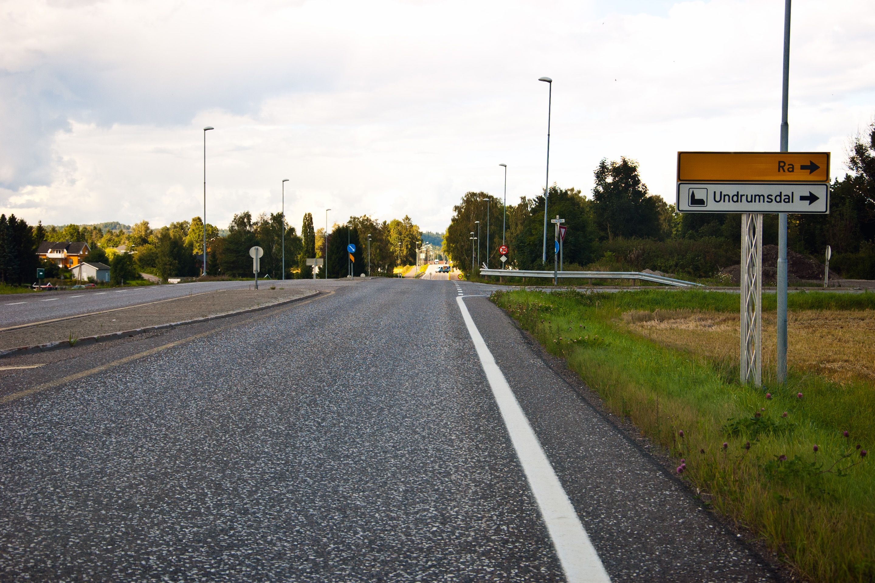 Fylkesvei 650 Undrumsdalveien, tidligere Europavei 18 gjennom Undrumsdal.